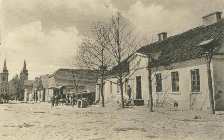 Беларуская (тарашкевіца): Лаздуны (Łazduny)